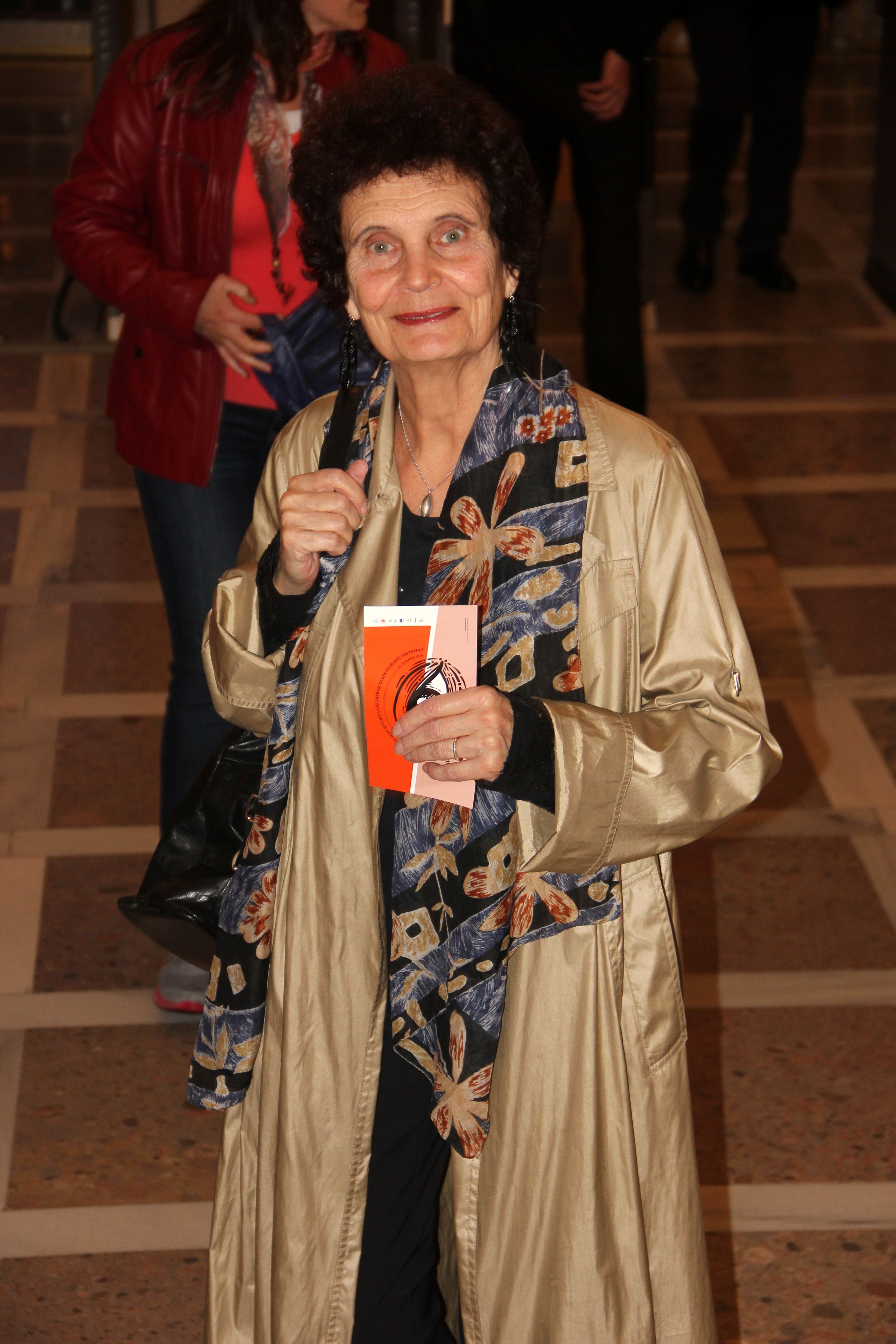 Anja Breien, 19. Uçan Süpürge Uluslararası Kadın Filmleri Festivali’nde. (Turkey, 2016)